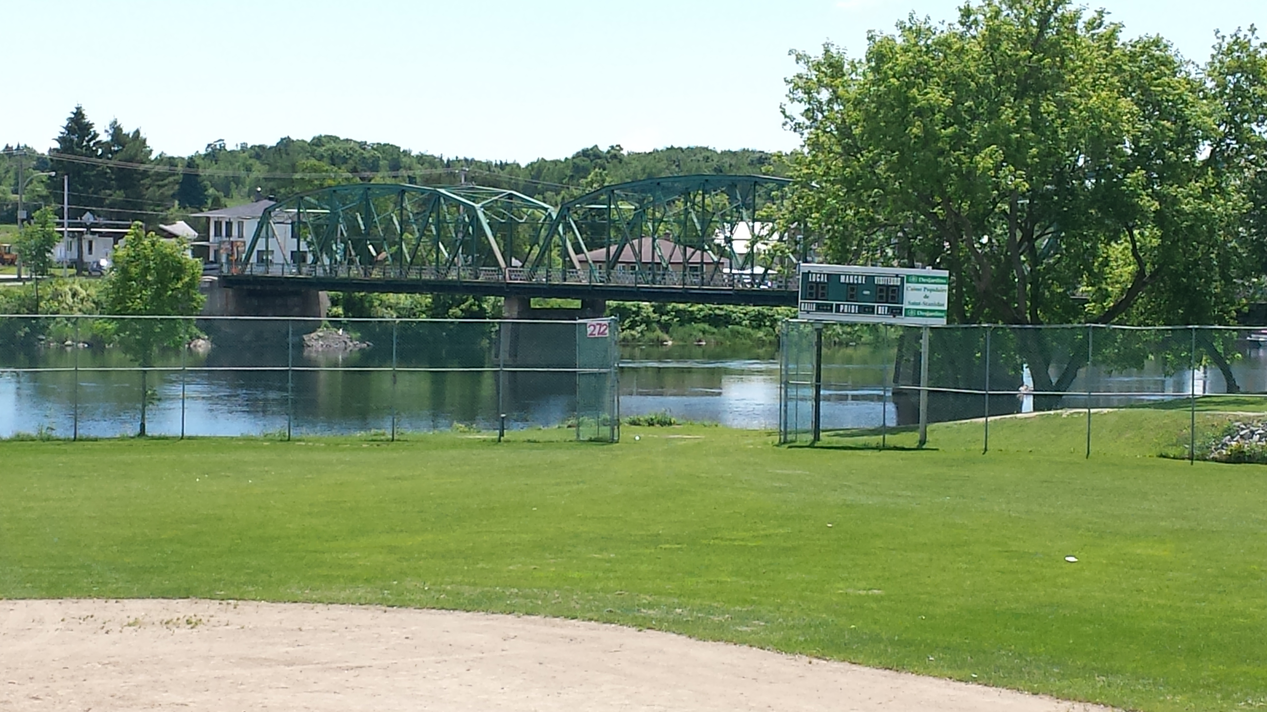 Pont routier enjambant la rivière Batiscan au village de Saint-Stanislas (Les Chenaux), en Mauricie, au Québec, au Canada.